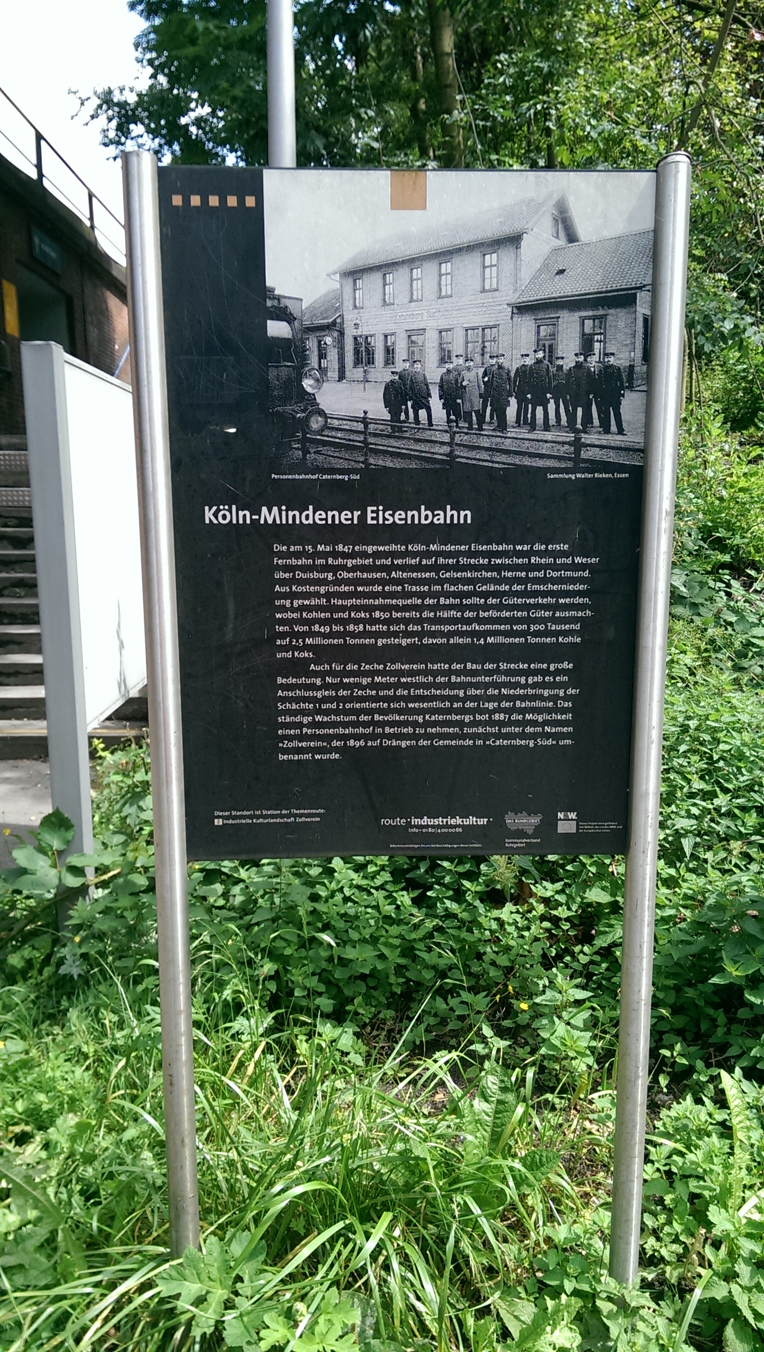 Schild der Köln-Mindener Eisenbahn